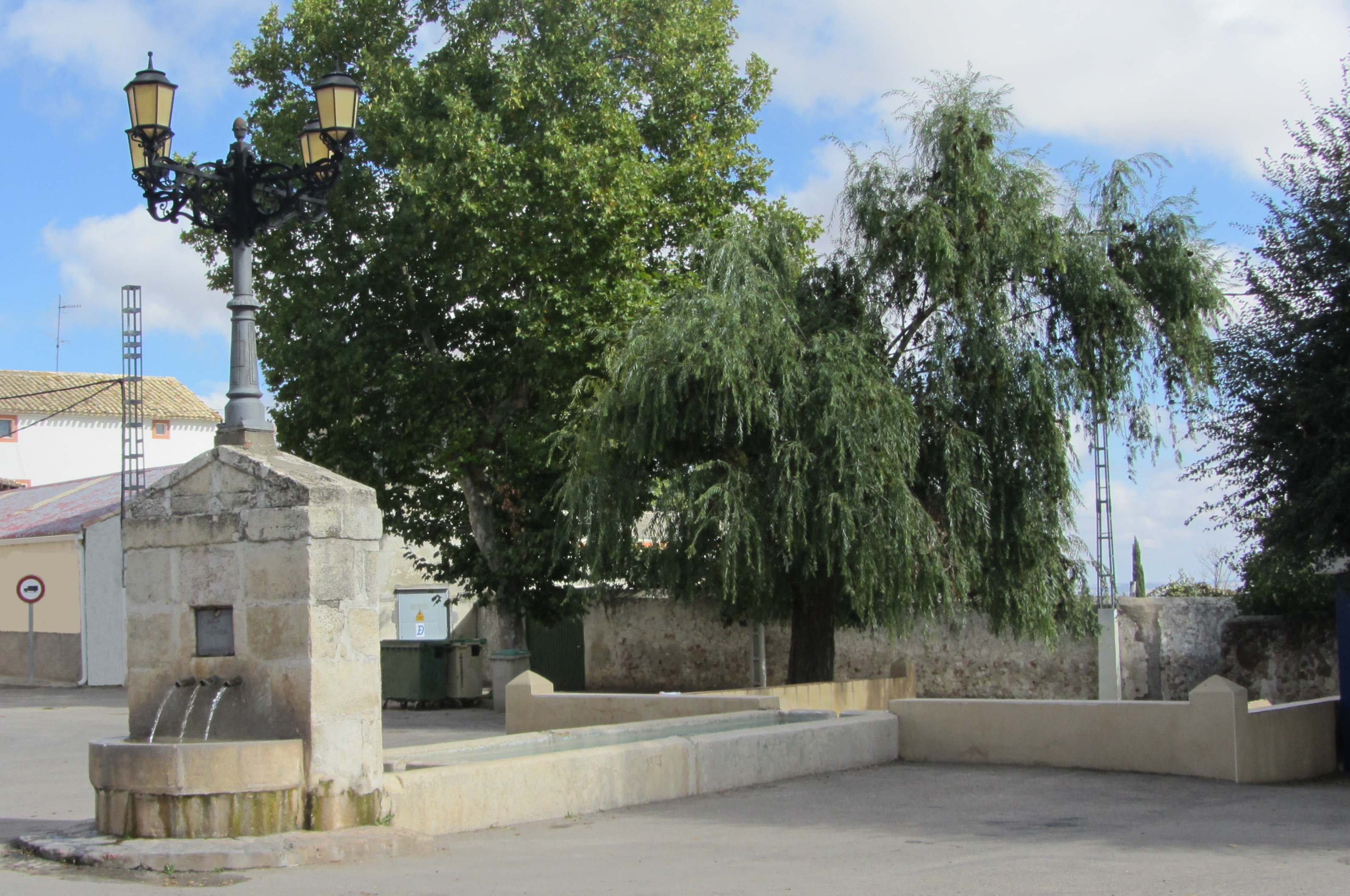 Fuente de Vellisca (Provincia de Cuenca - España) construida en piedra en 1874.